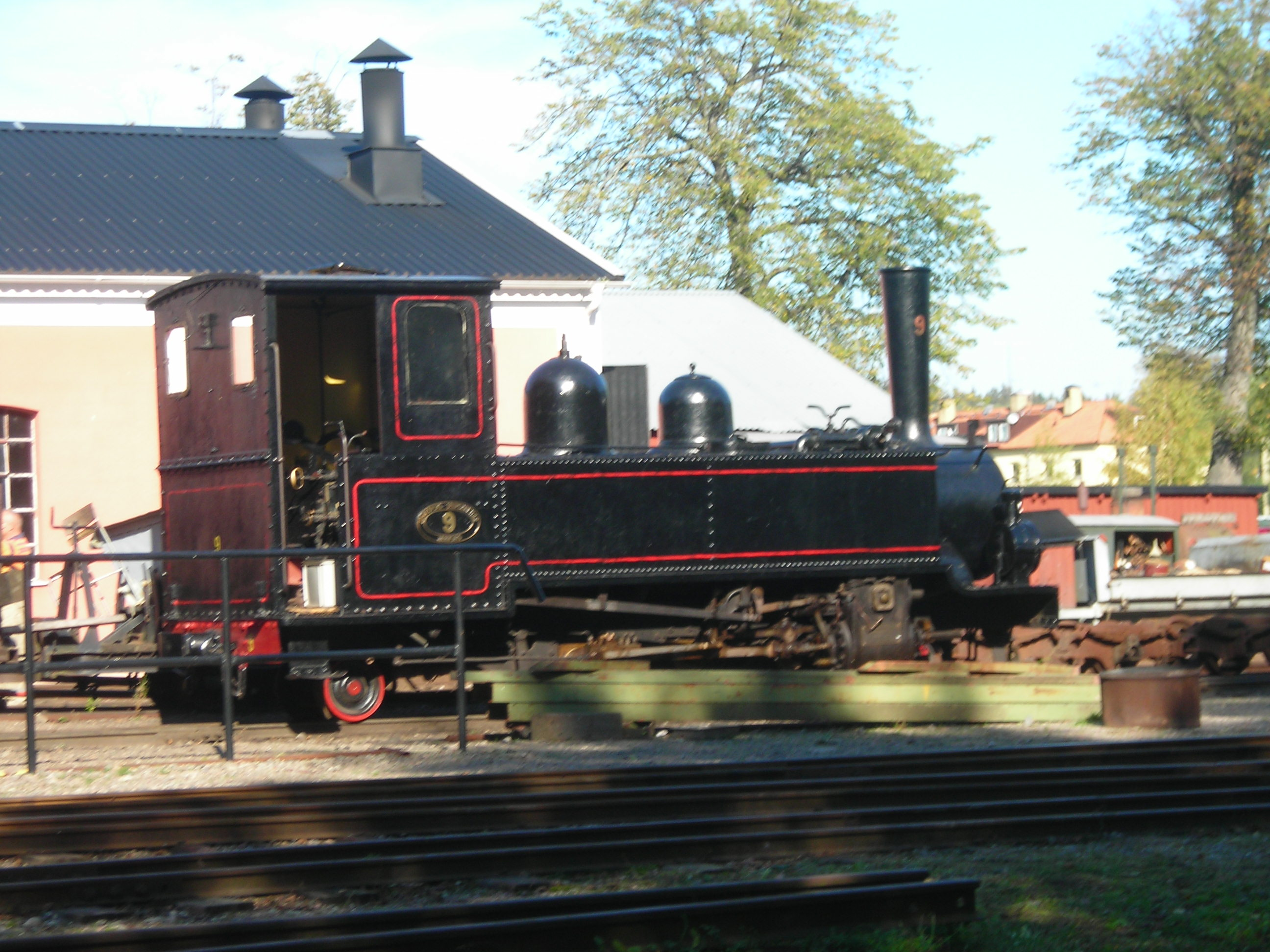 Museibanans dag: Loket JGJ 9 uppställt utanför verkstaden i Mariefred.